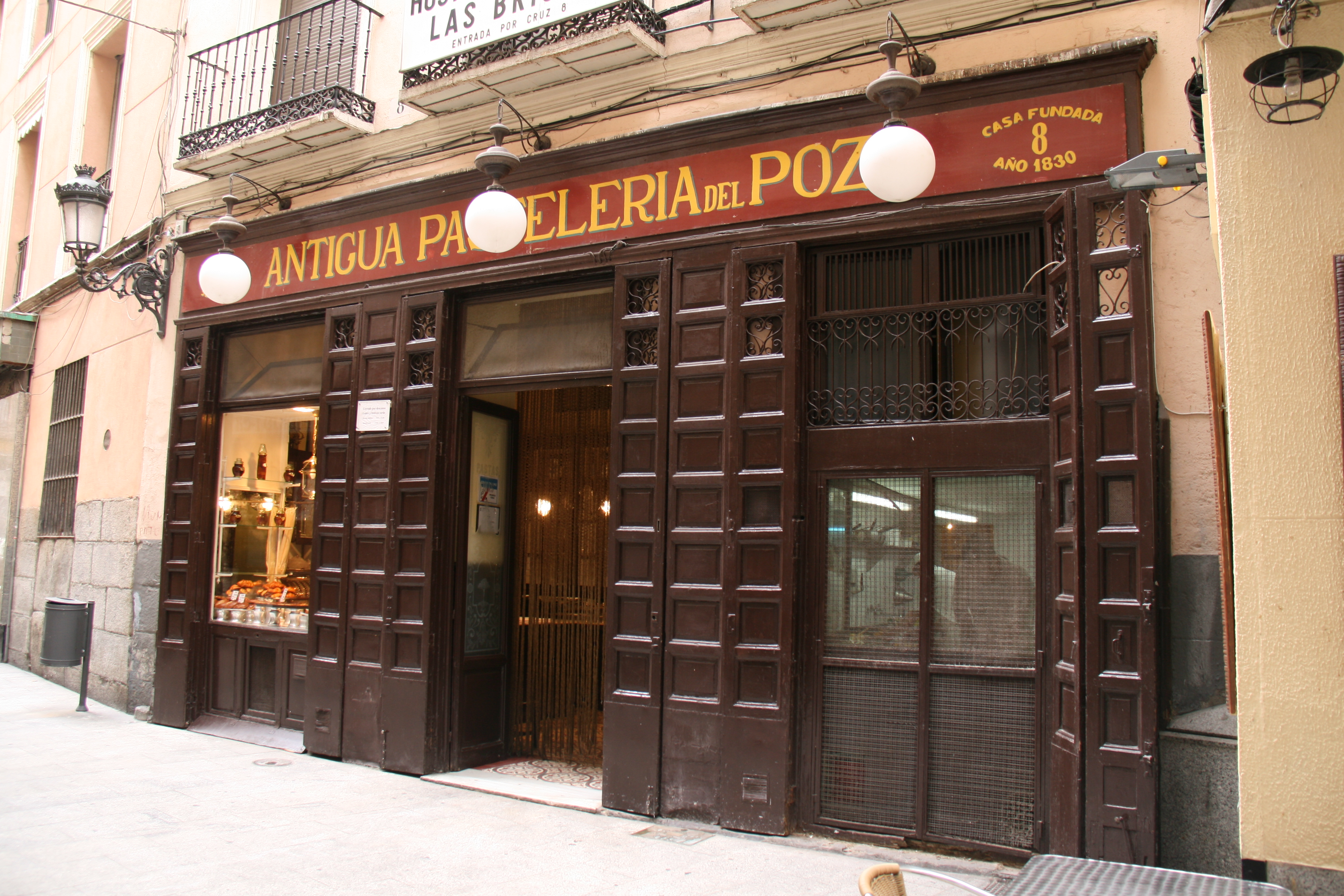 Pastelería el Pozo - Madrid (Calle del Pozo 8)